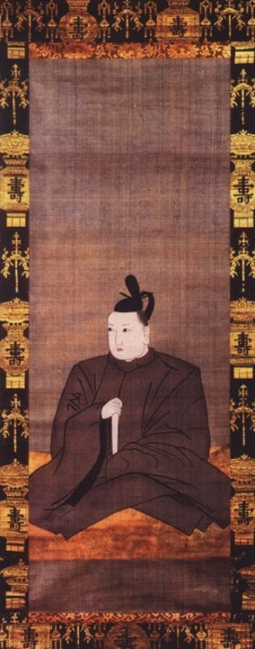 宗像氏貞の肖像。